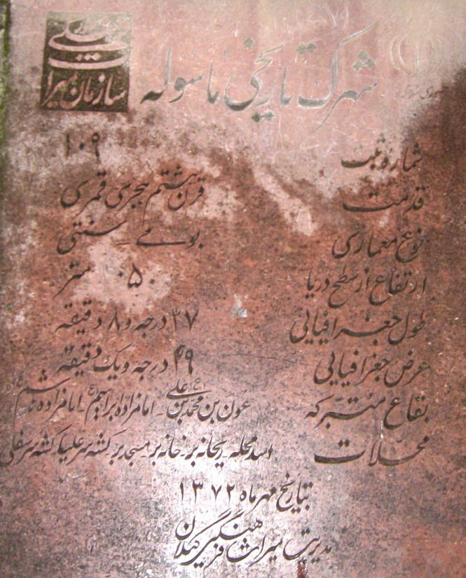 کتیبه سازمان میراث فرهنگی در ابتدای روستای ماسوله در گیلان